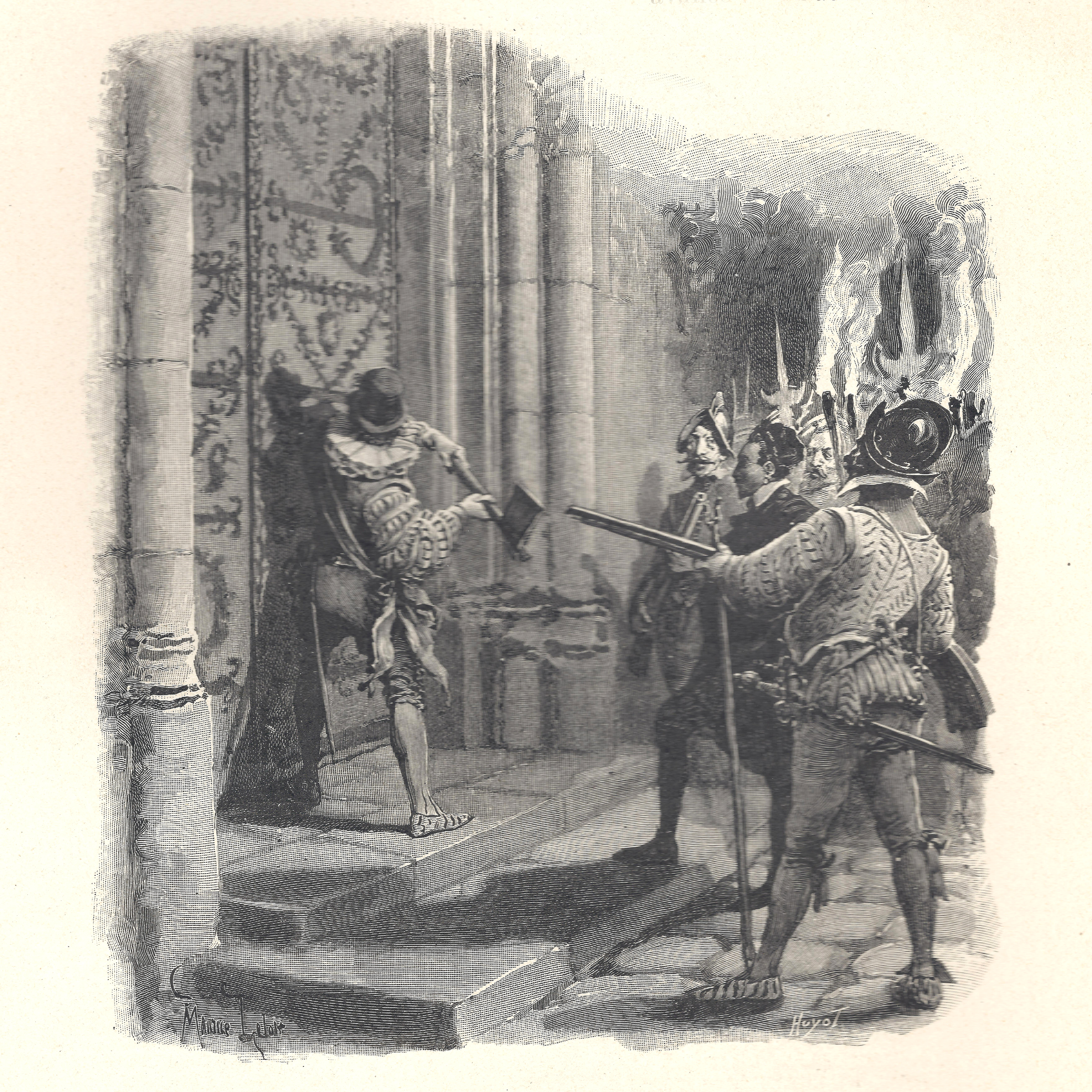 composition de Maurice Leloir et gravure sur bois de Jules Huyot se trouvant p.396 : "-Voilà Sire", reprit Crillon, en déchargeant dans la porte un violent coup de hache.